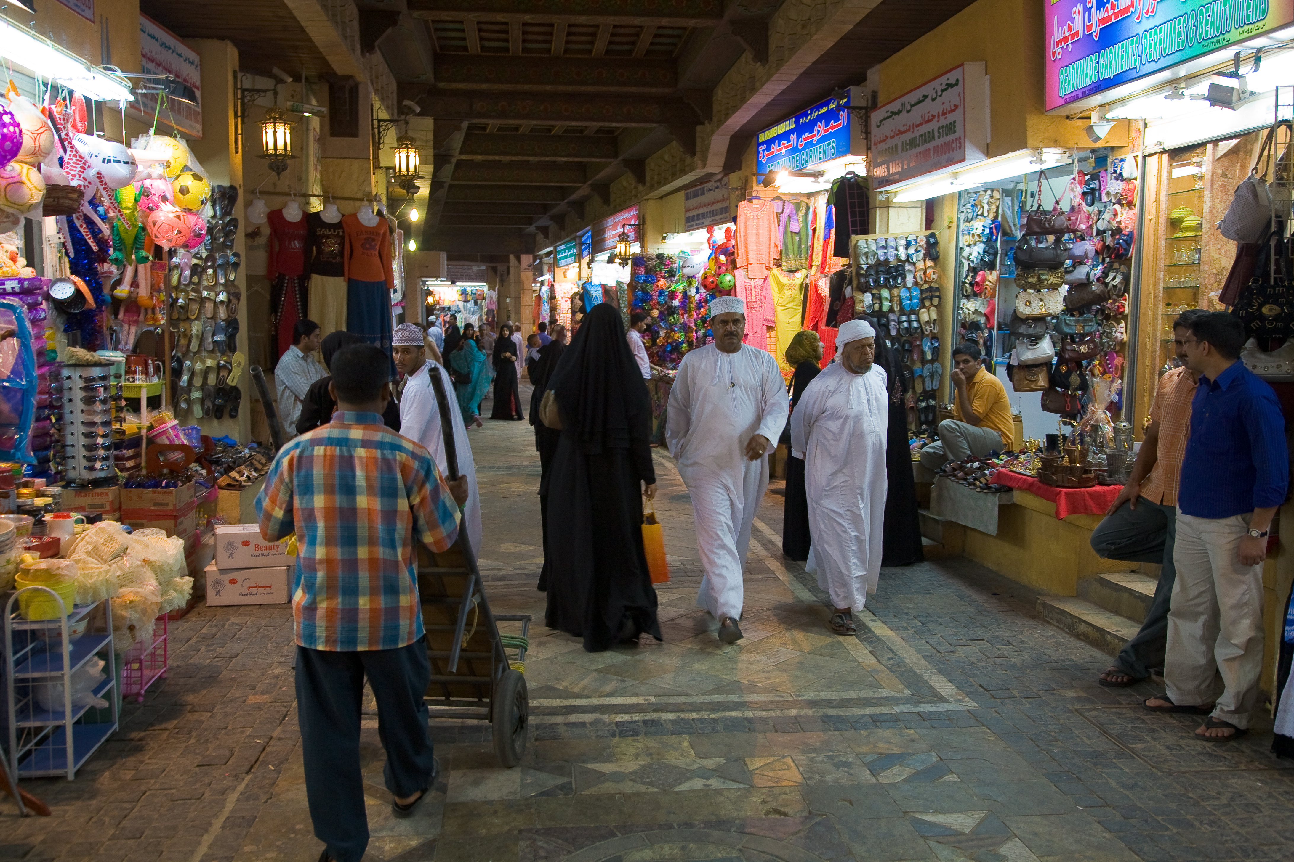 Market in Muttrah, Muscat, Oman